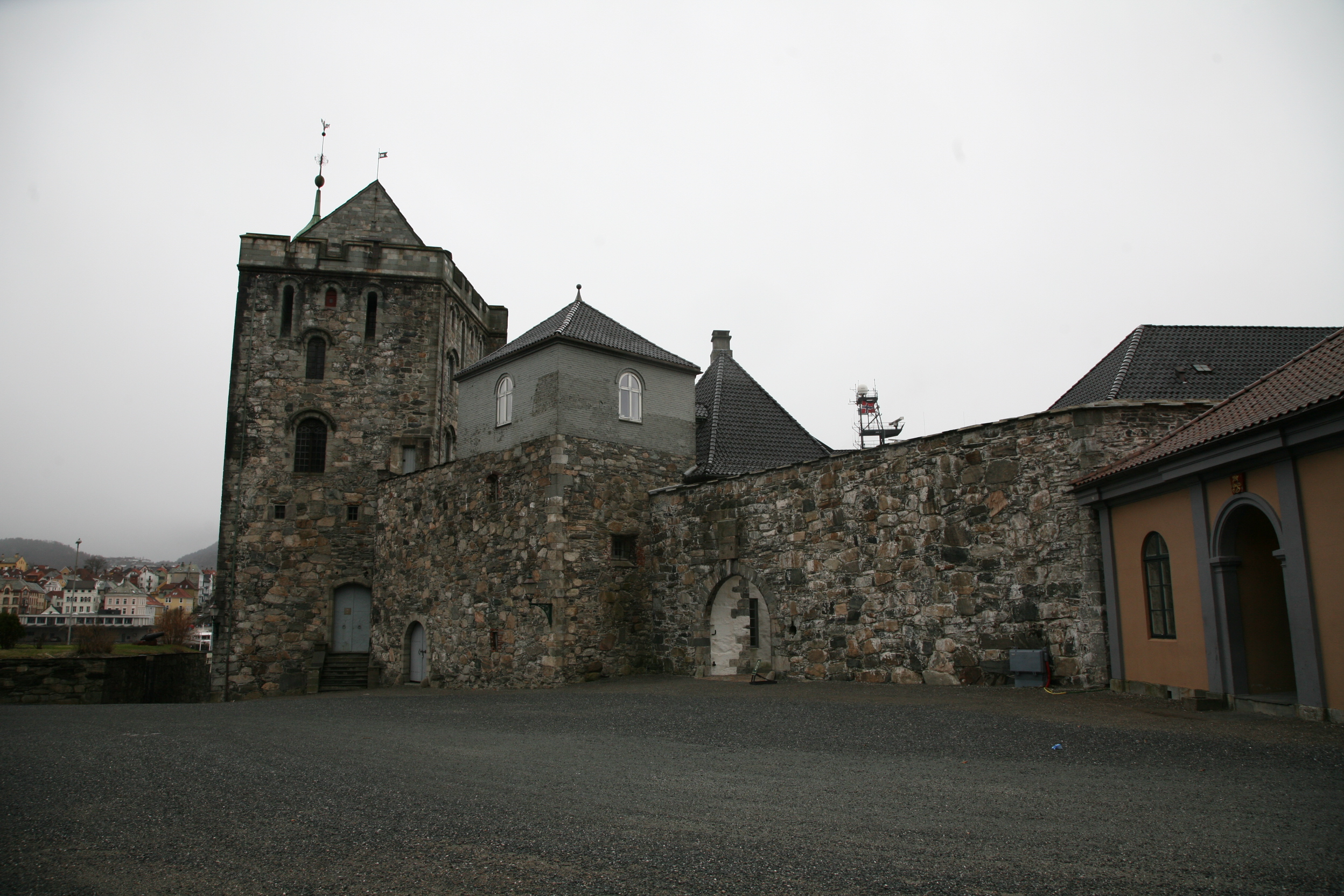 Bergenhus festning